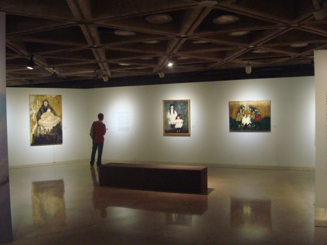 Interior de la Galería de Artes Plásticas del Museo del Oro.